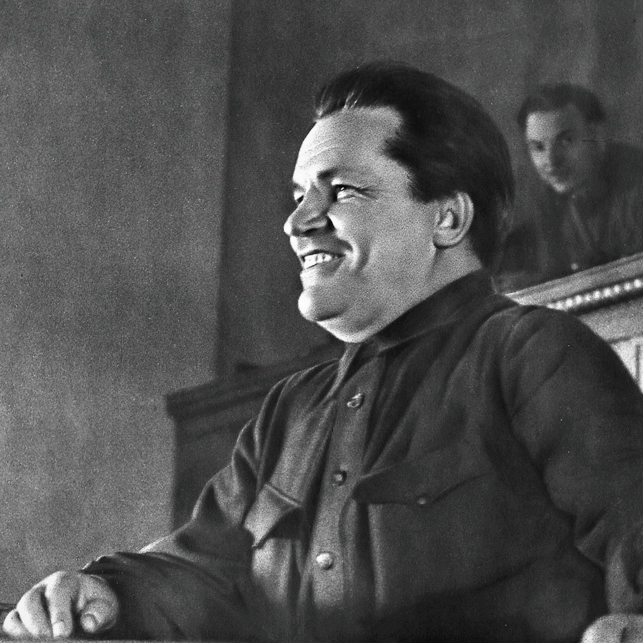 С.М. Киров на трибуне XVII съезда ВКП(б)